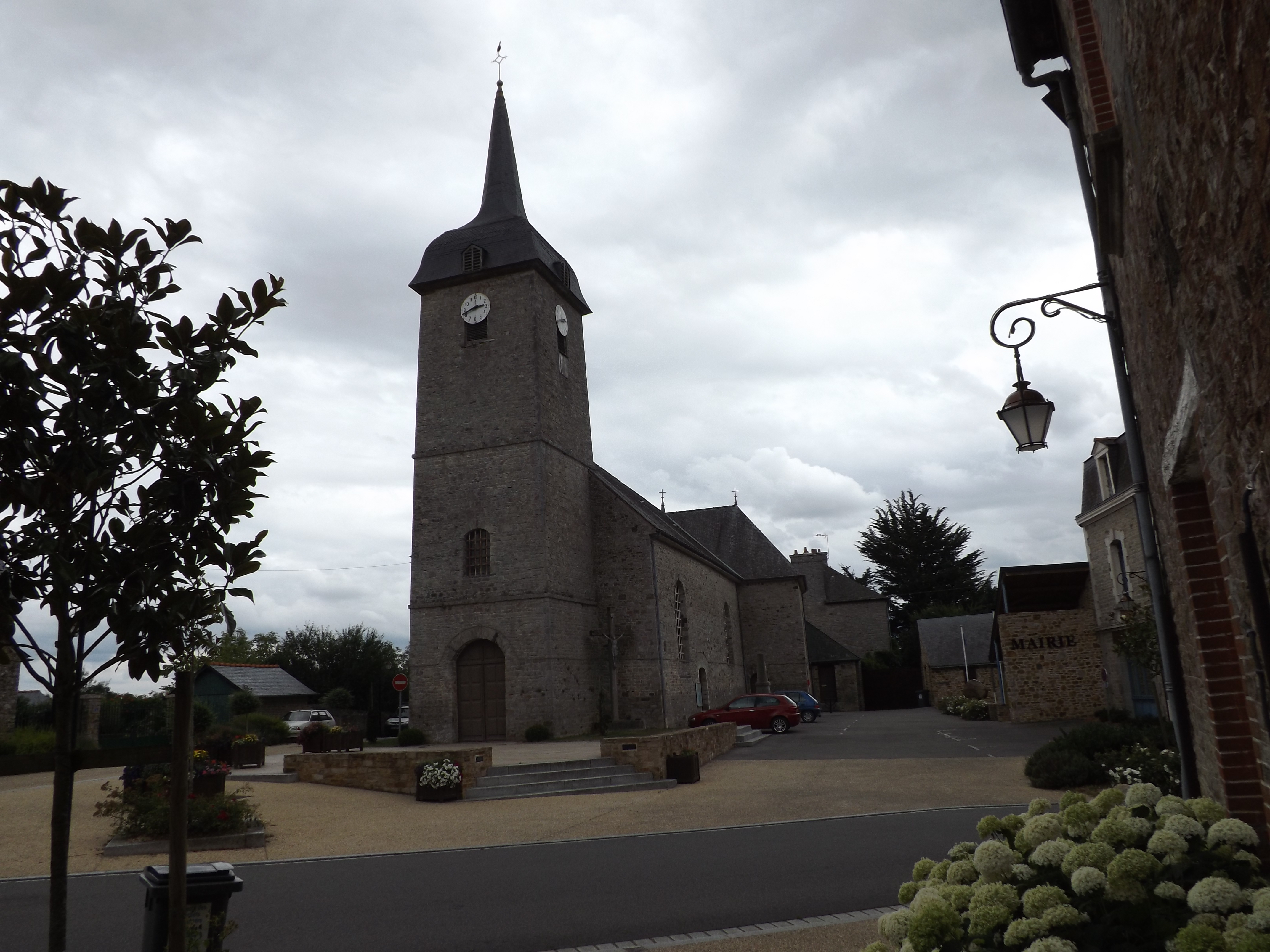 Place de l'église de Thourie, Ille et Vilaine, France